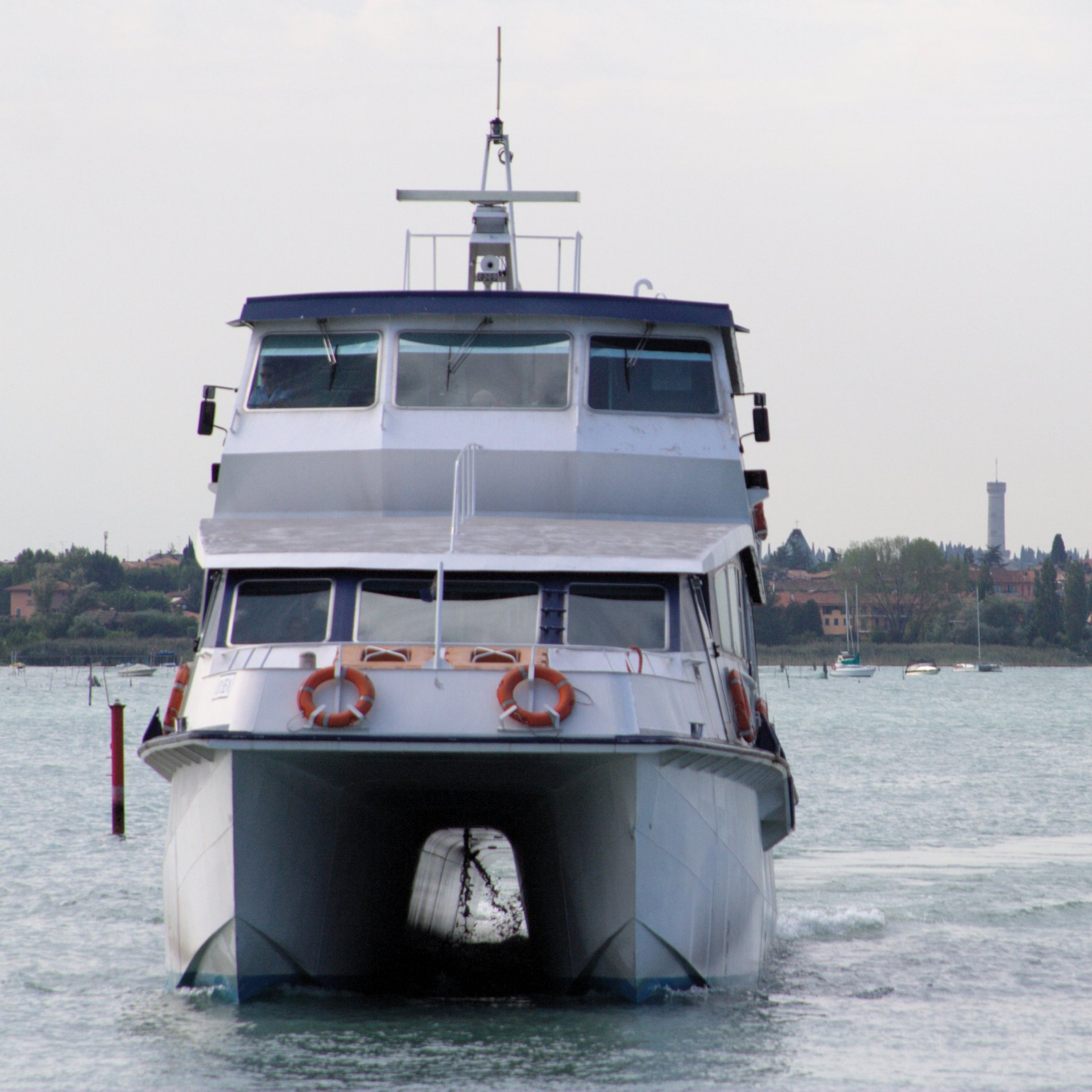 Catamarano per il trasporto veloce sul lago di Garda